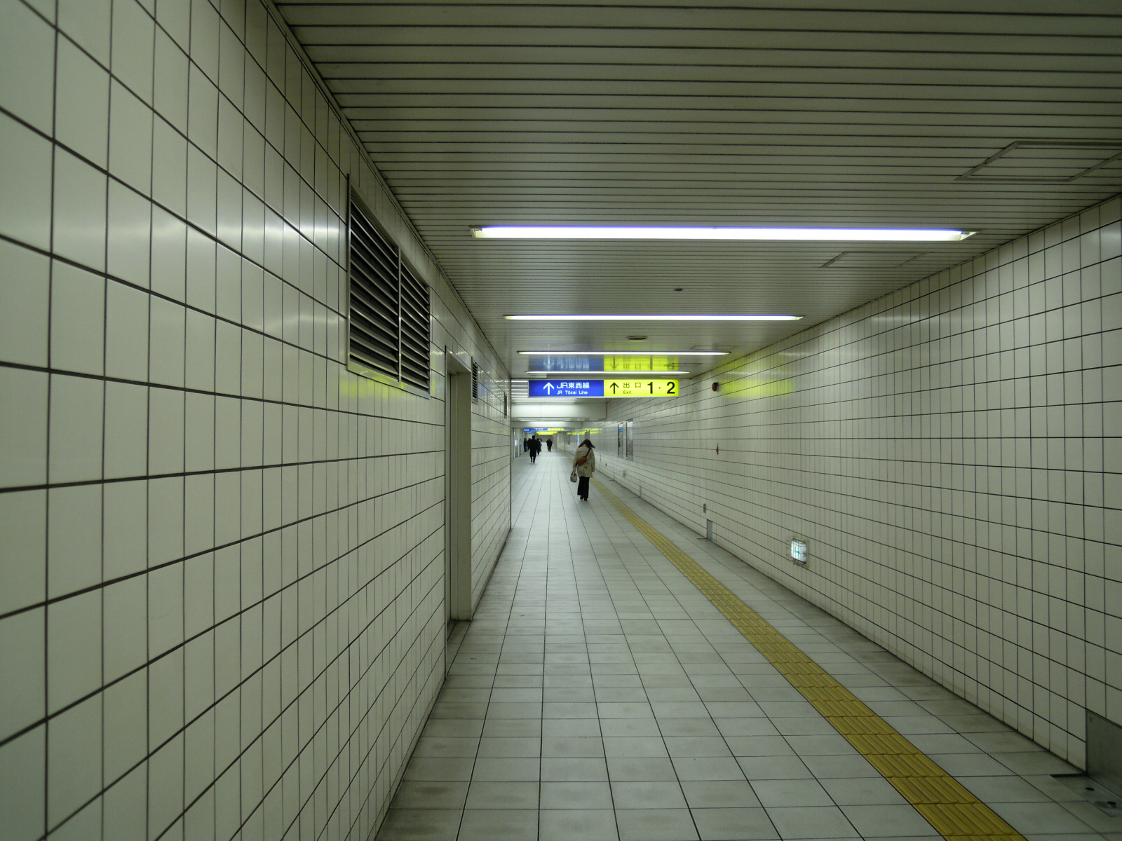 JR Shinfukushima station